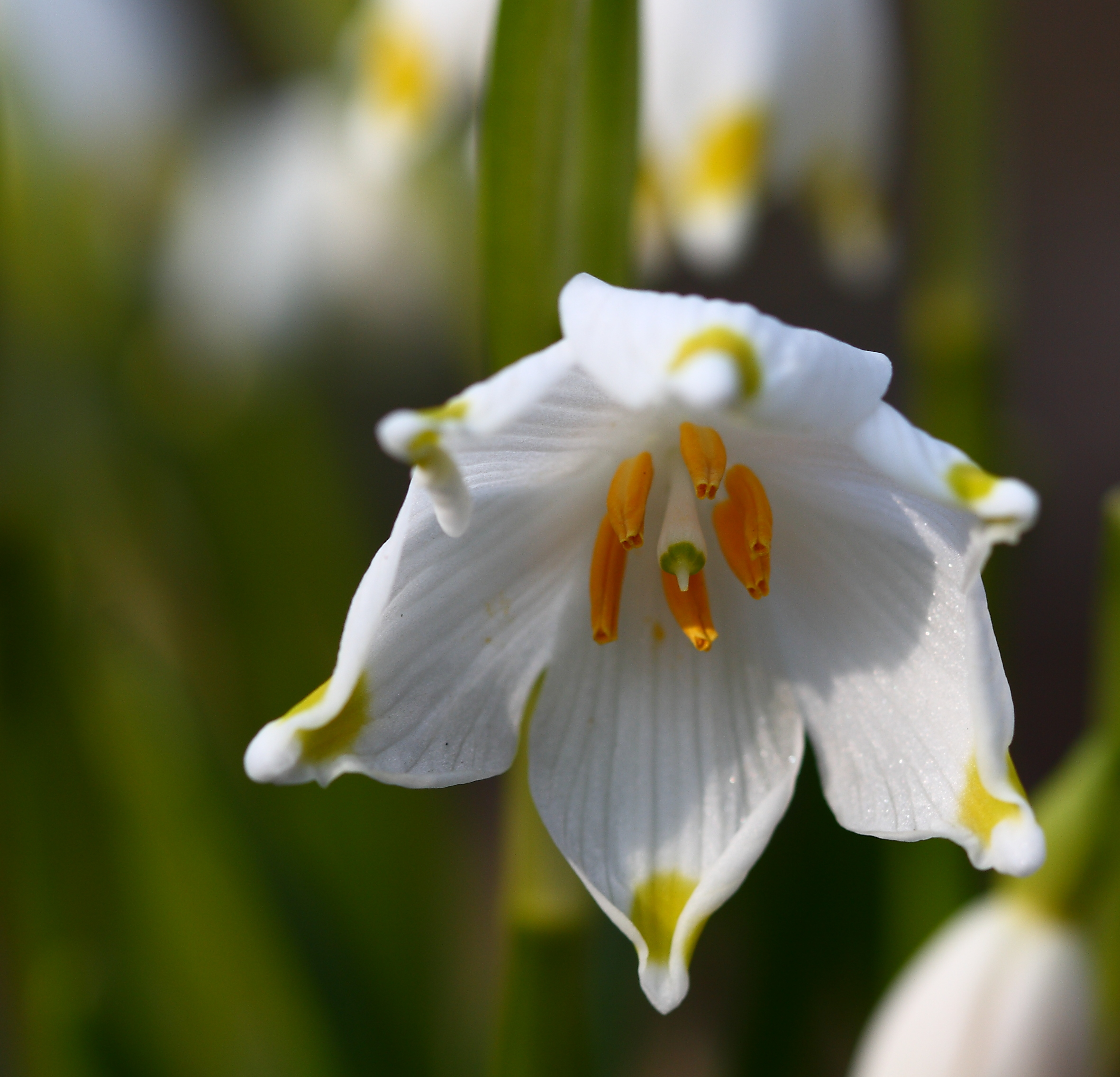 Märzenbecher: Detail aus dem Foto Märzenbecher 2107